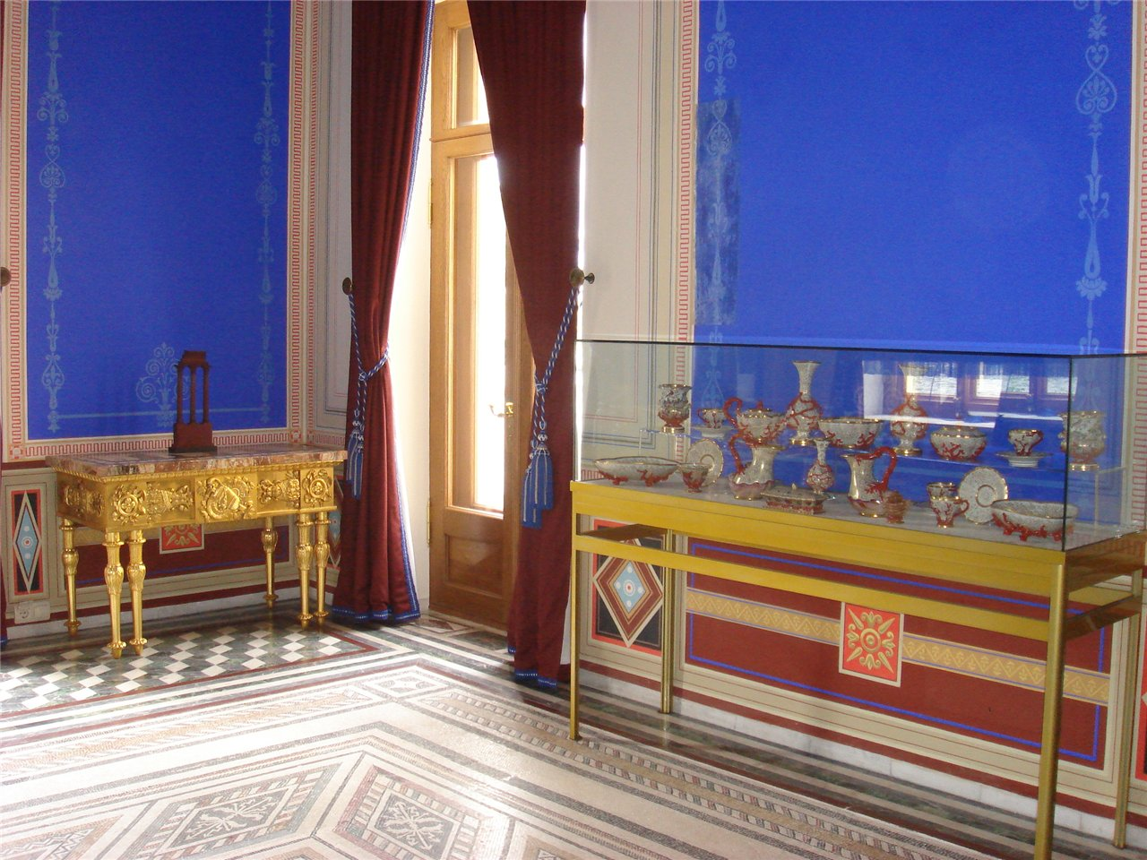 Столовая в Царицыном павильоне